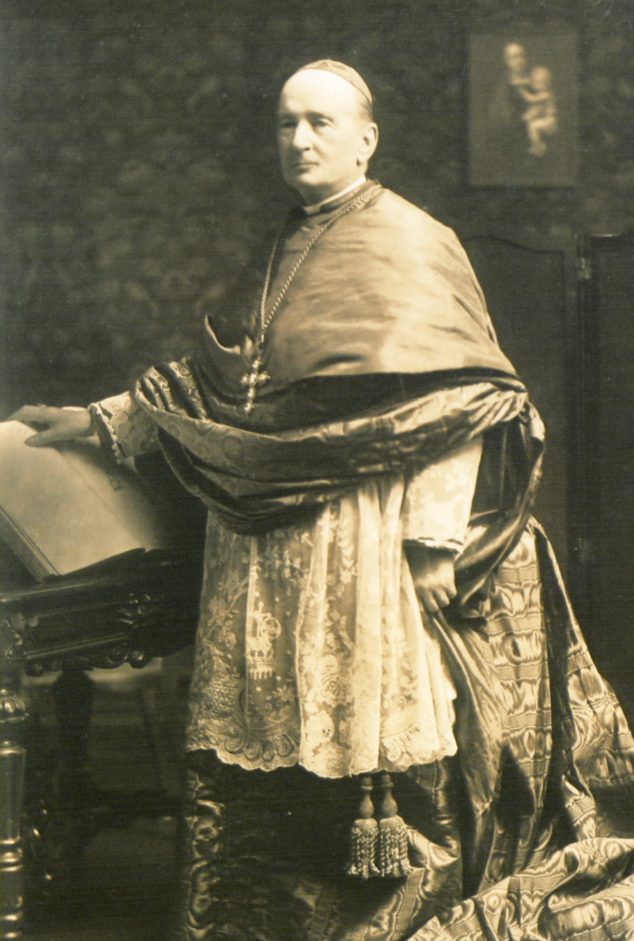 Original caption: "Son Eminence le Cardinal Begin."